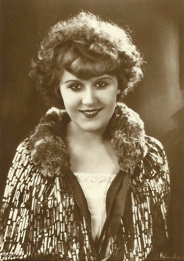 Mary Kid (eigentlich Marie Anna Albertine Keul; * 8. August 1901; † 29. Oktober 1988), deutsche Schauspielerin